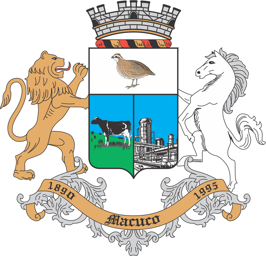 Brasão de Macuco/RJ